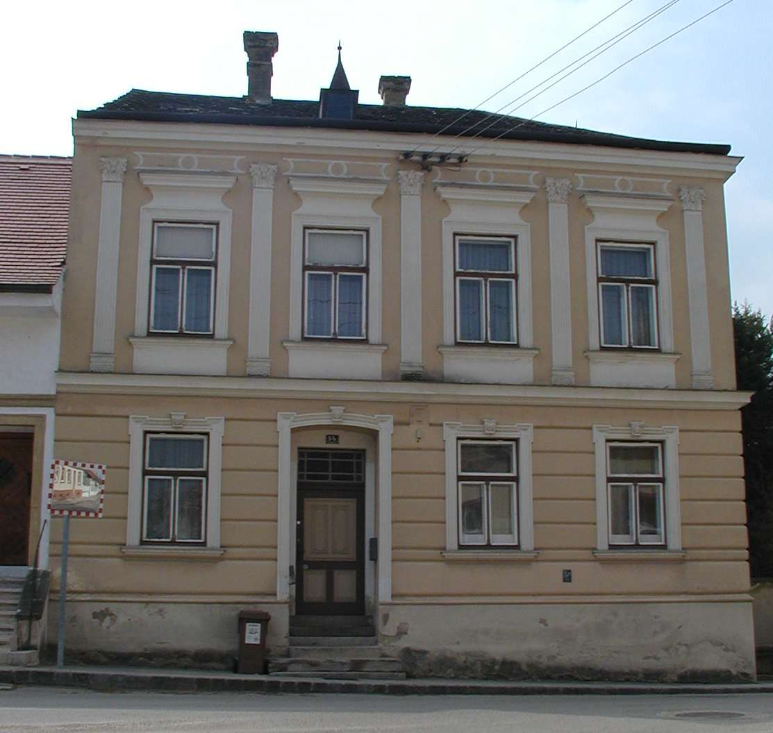 Sitzendorf Hauptplatz 14